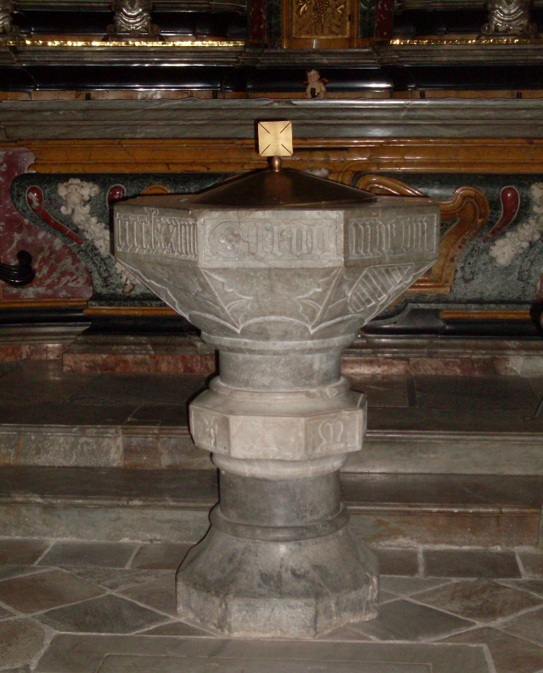 fonte battesimale XV° secolo Parrocchia San Giovanni Battista Racconigi